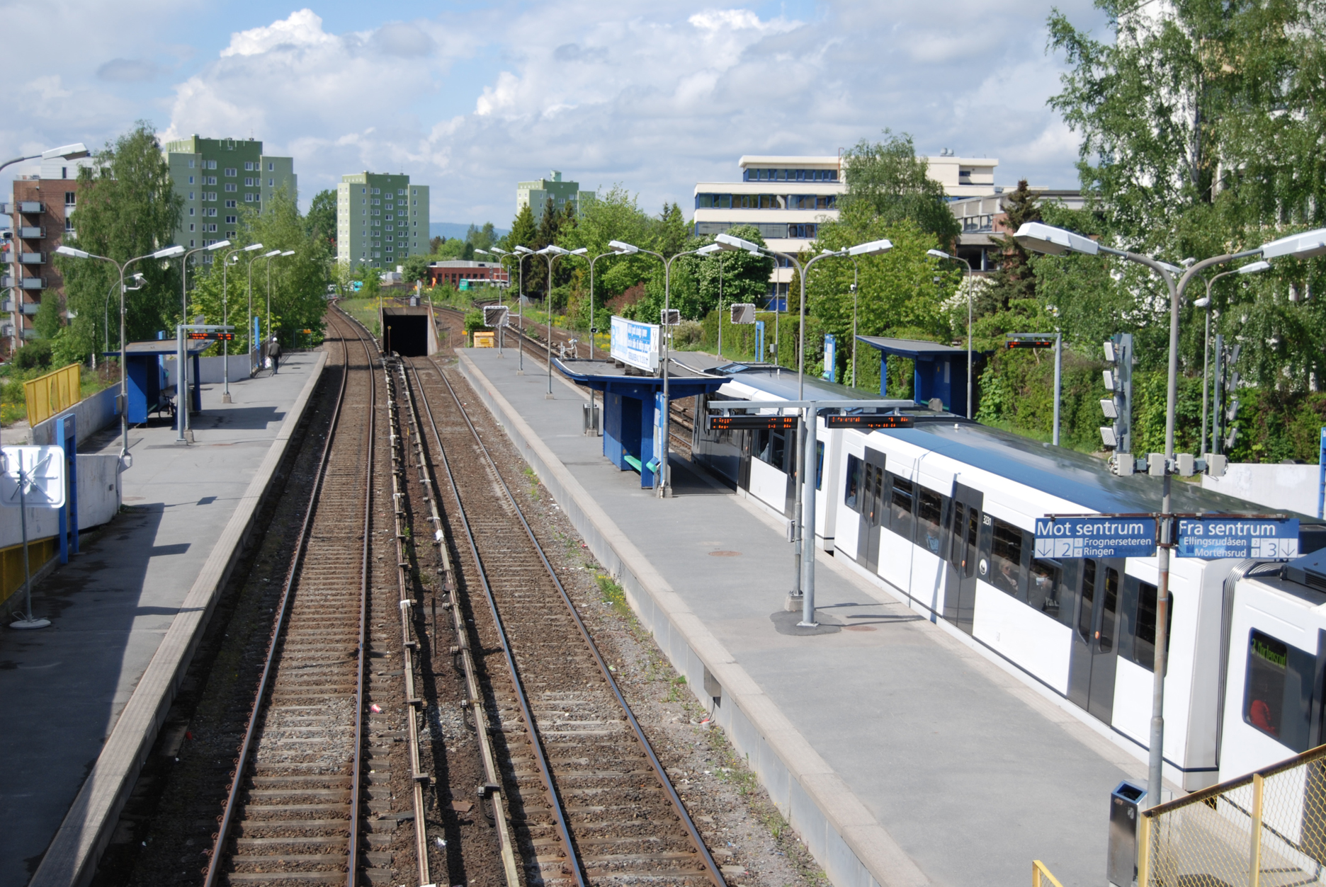 Stacja T-banen: Brynseng-Oslo